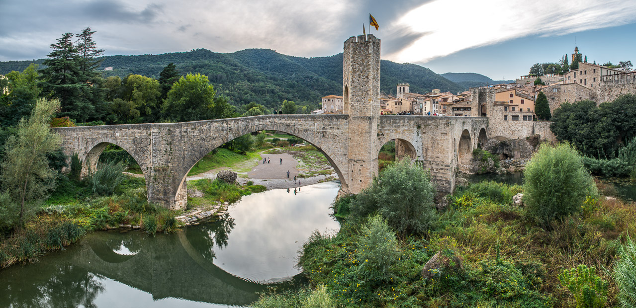 Panorámica del Pont Vell de Besalú.